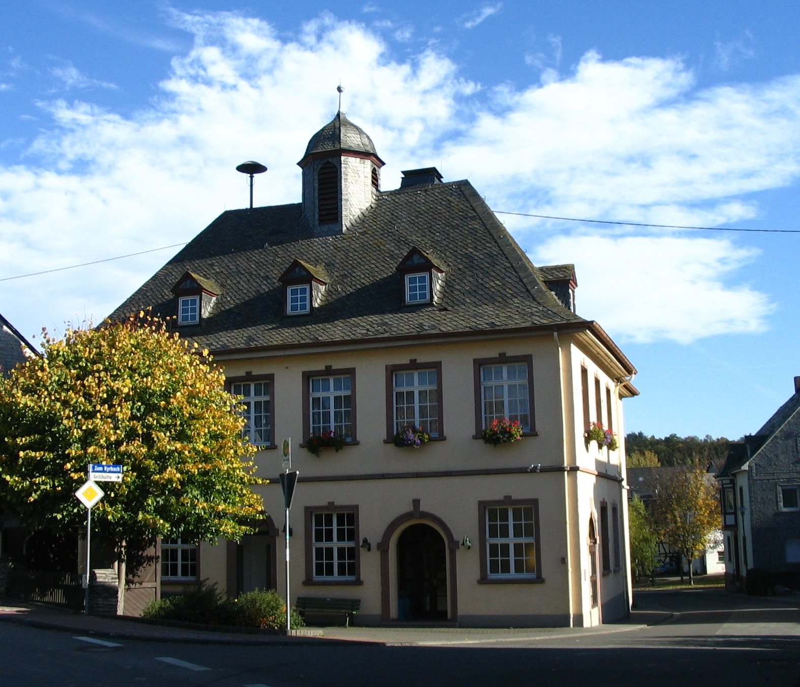 Gemeindehaus Ober Kostenz im Hunsrück